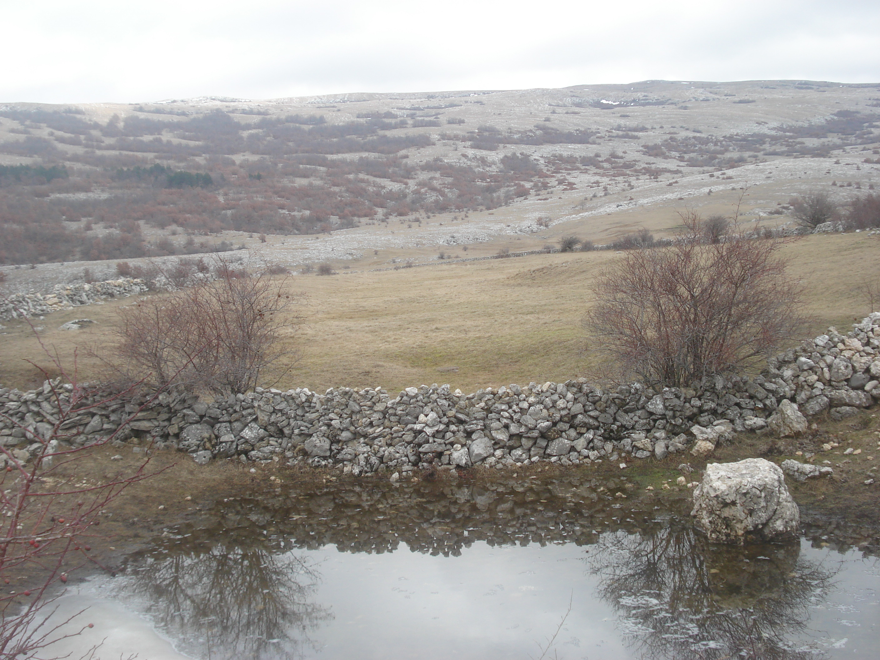 Pogled na Ljubušu